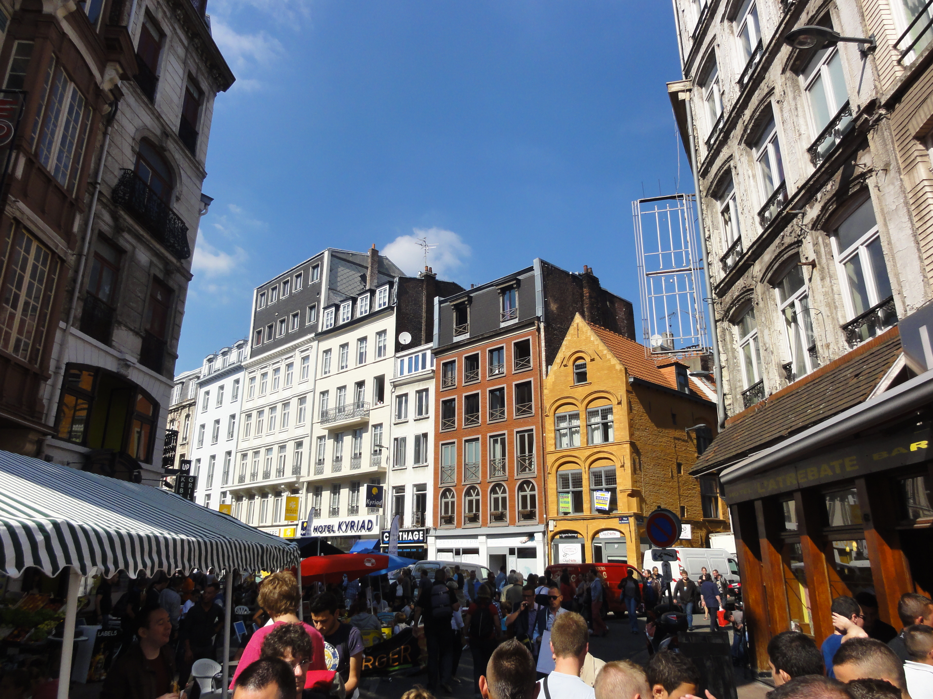 L'édition 2012 de la Braderie de Lille s'est déroulée du samedi 1er au dimanche 2 septembre.